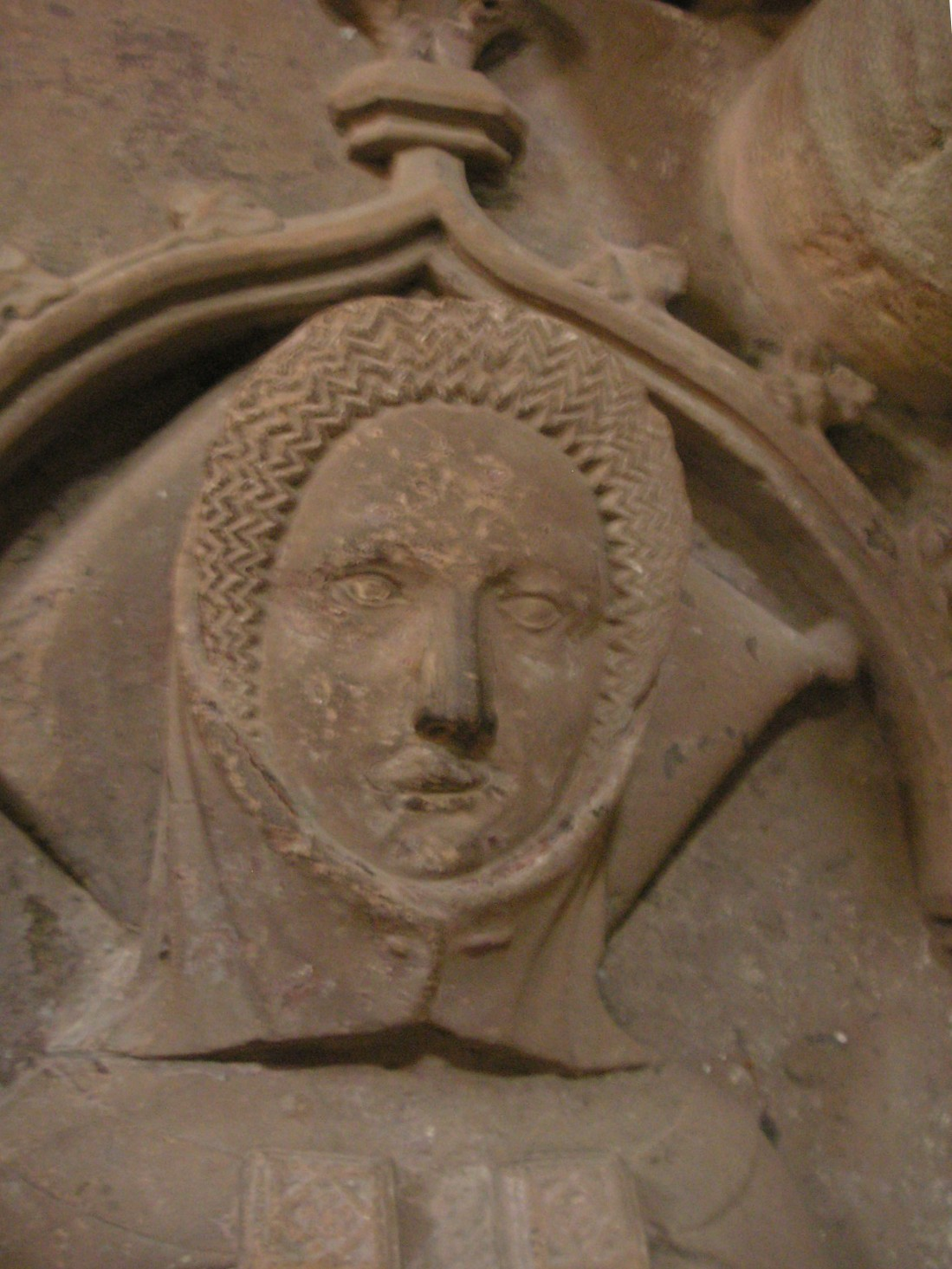 Katharina Markgräfin von Baden, geborene Gräfin von Thierstein. †1385